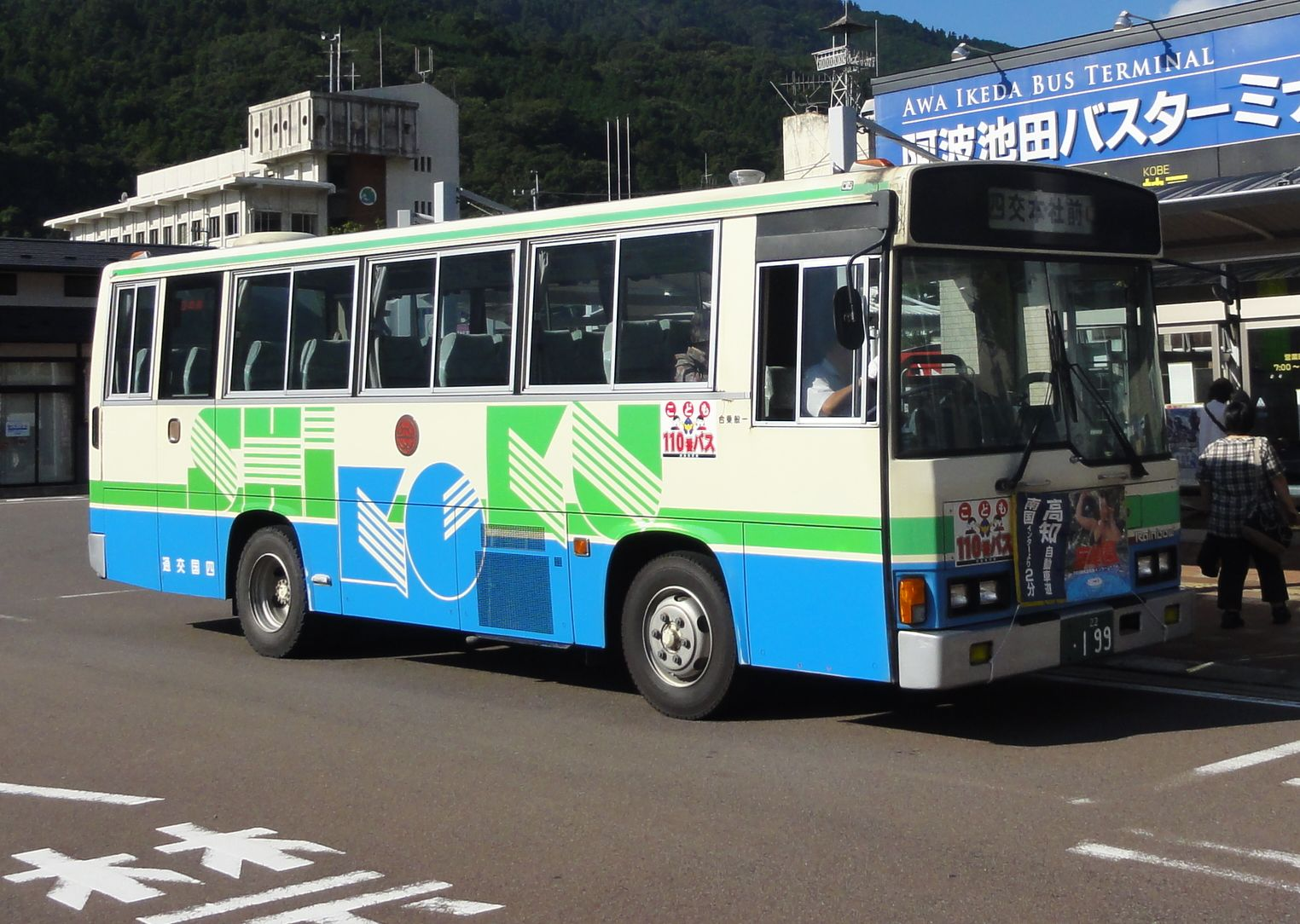 四国交通